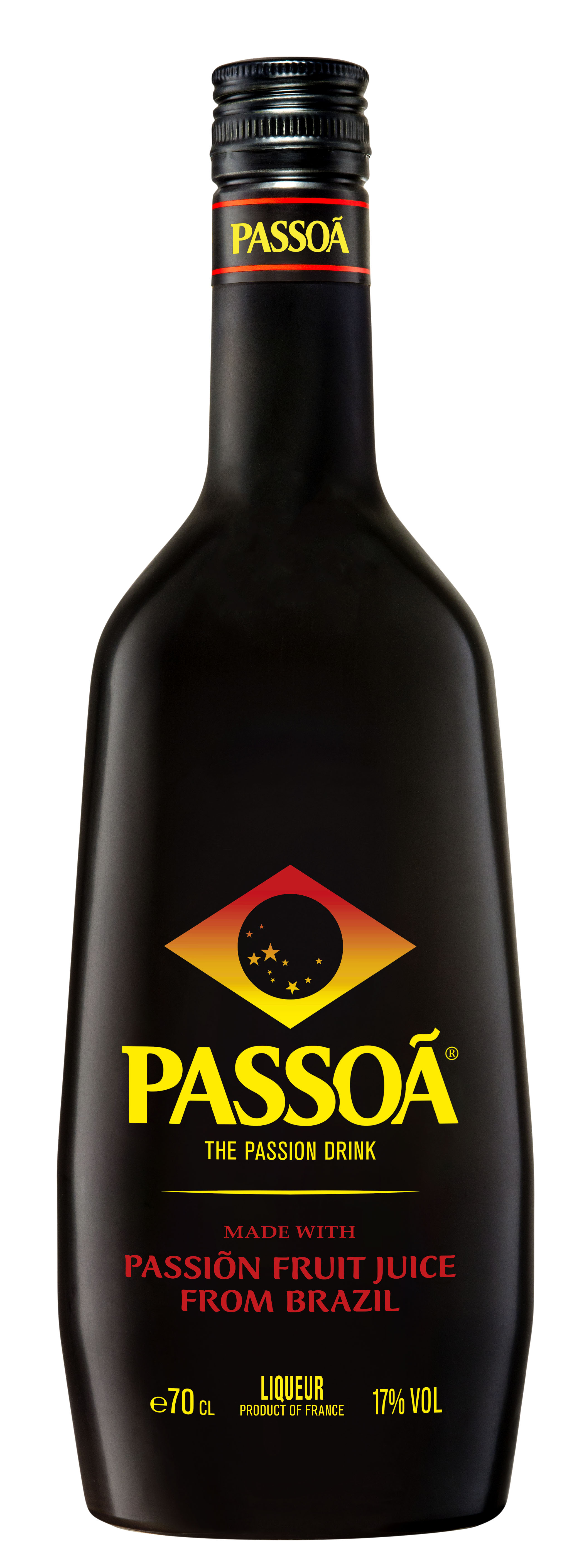 Bouteille de liqueur de fruit de la passion d'une contenance de 70 cl recouverte d'un manchon noir opaque.